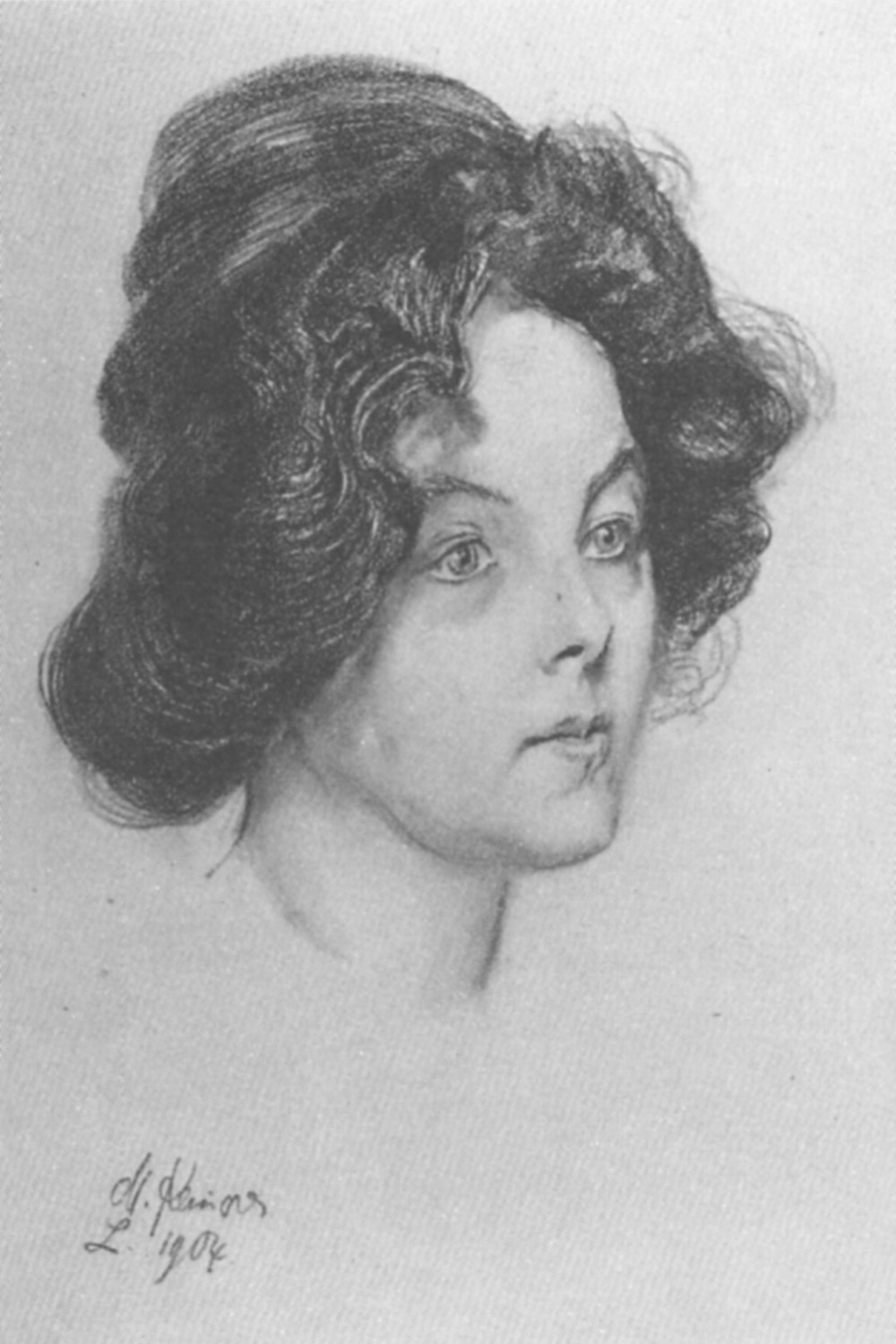 Max Klinger: Bildnis Elsa Asenijeff. 1904, Zeichnung, Museum der bildenden Künste zu Leipzig